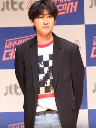 5월 2일 수요일 오전 서울 마포구 JTBC빌딩 2층 JTBC홀에서 JTBC4 댄싱버라이어티 프로그램 ‘WHYNOT-더 댄서’제작발표회가 열렸다. 김학준 CP, 슈퍼주니어 은혁, 하이라이트 이기광, 샤이니 태민이 참석해 하이라이트 영상 시사, 포토타임, 공동 인터뷰 등을 진행됐다.